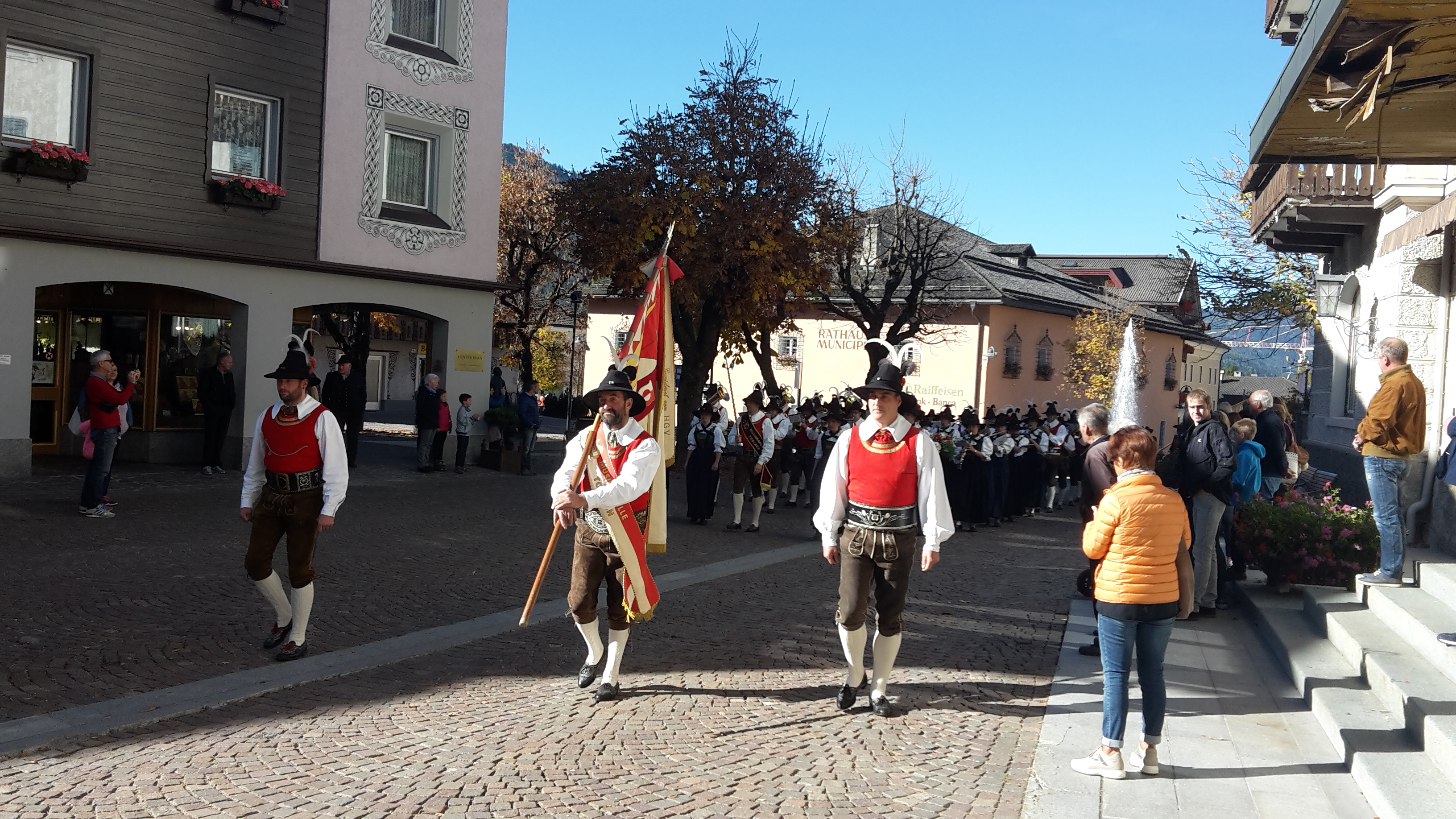 Musikkapelle Toblach